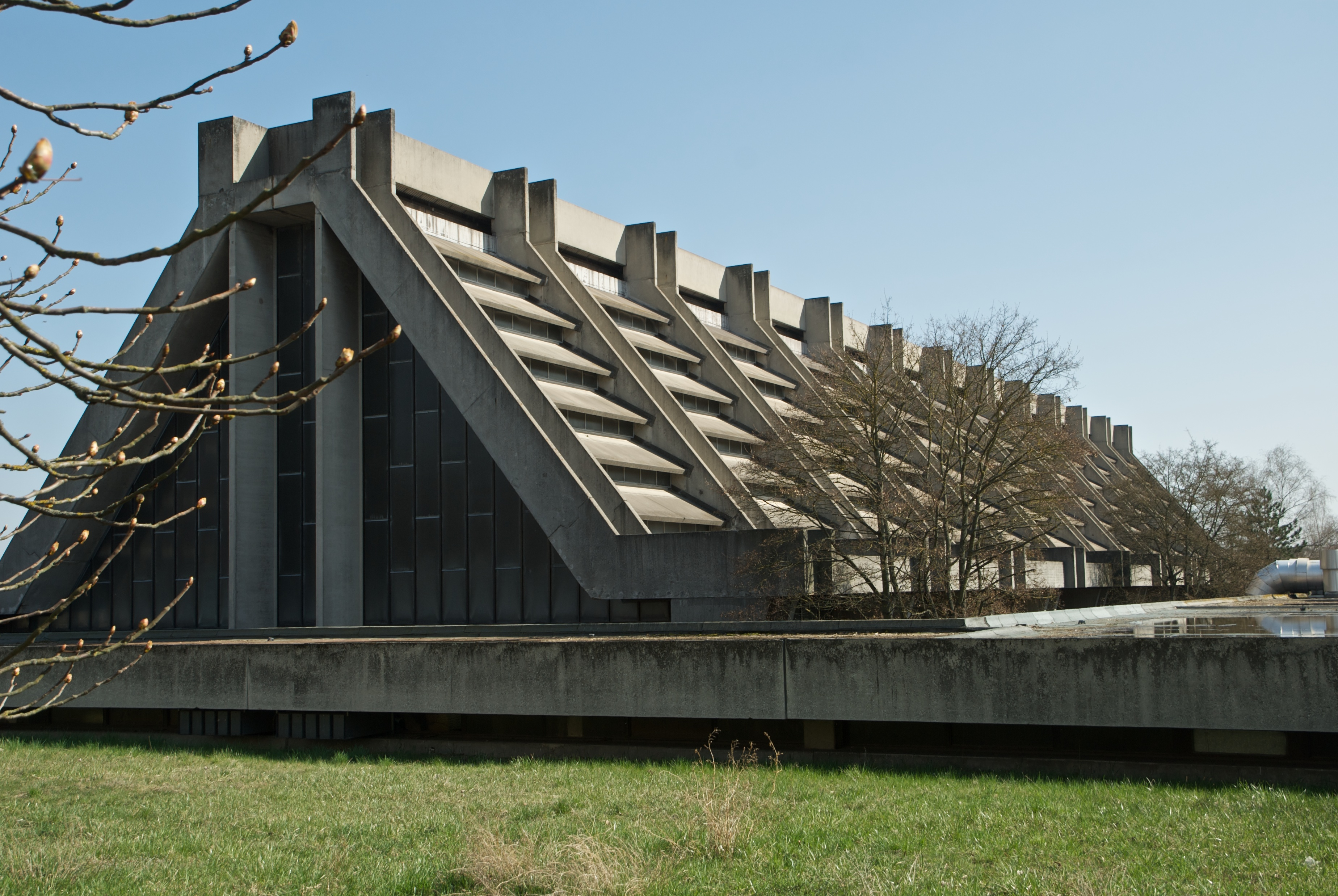 Glaswerk, Entwurf Walter Gropius 1967, Amberg/Opf.This is a photograph of an architectural monument.